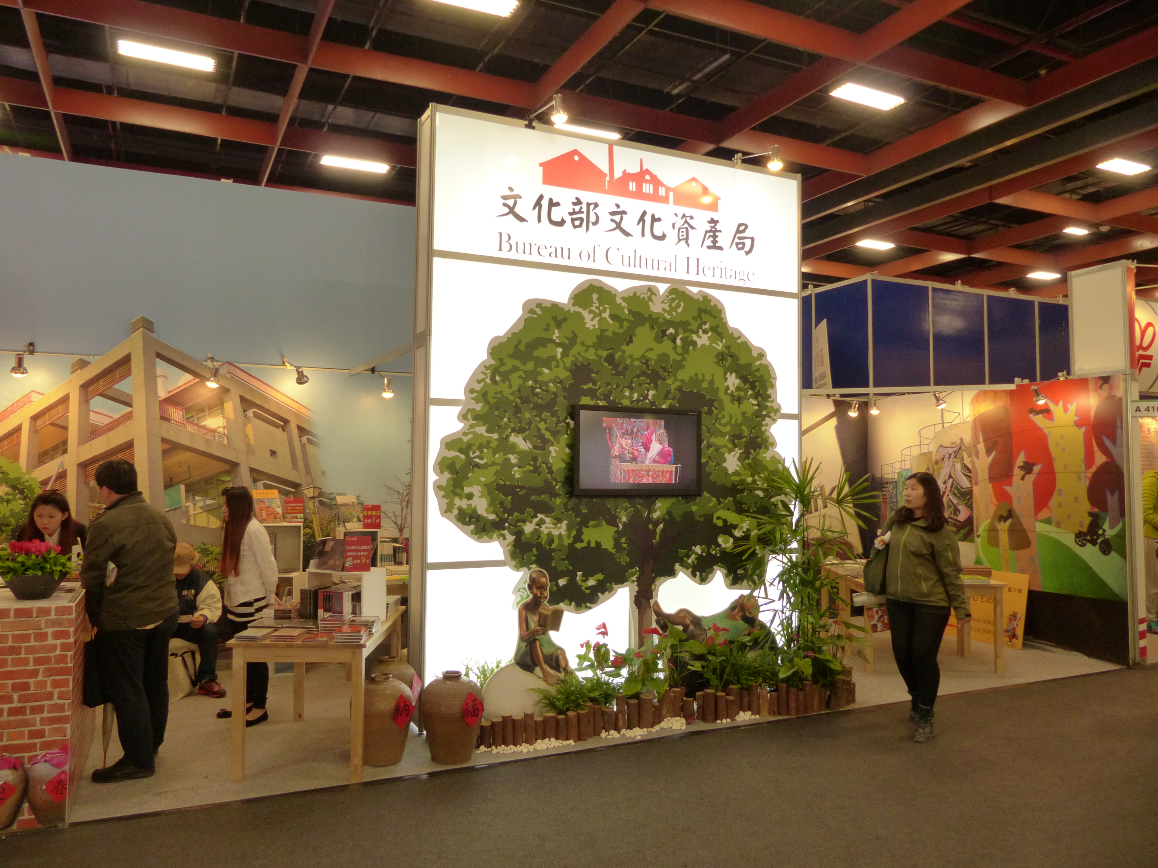 第22屆臺北國際書展，世貿一館文化部文化資產局攤位。